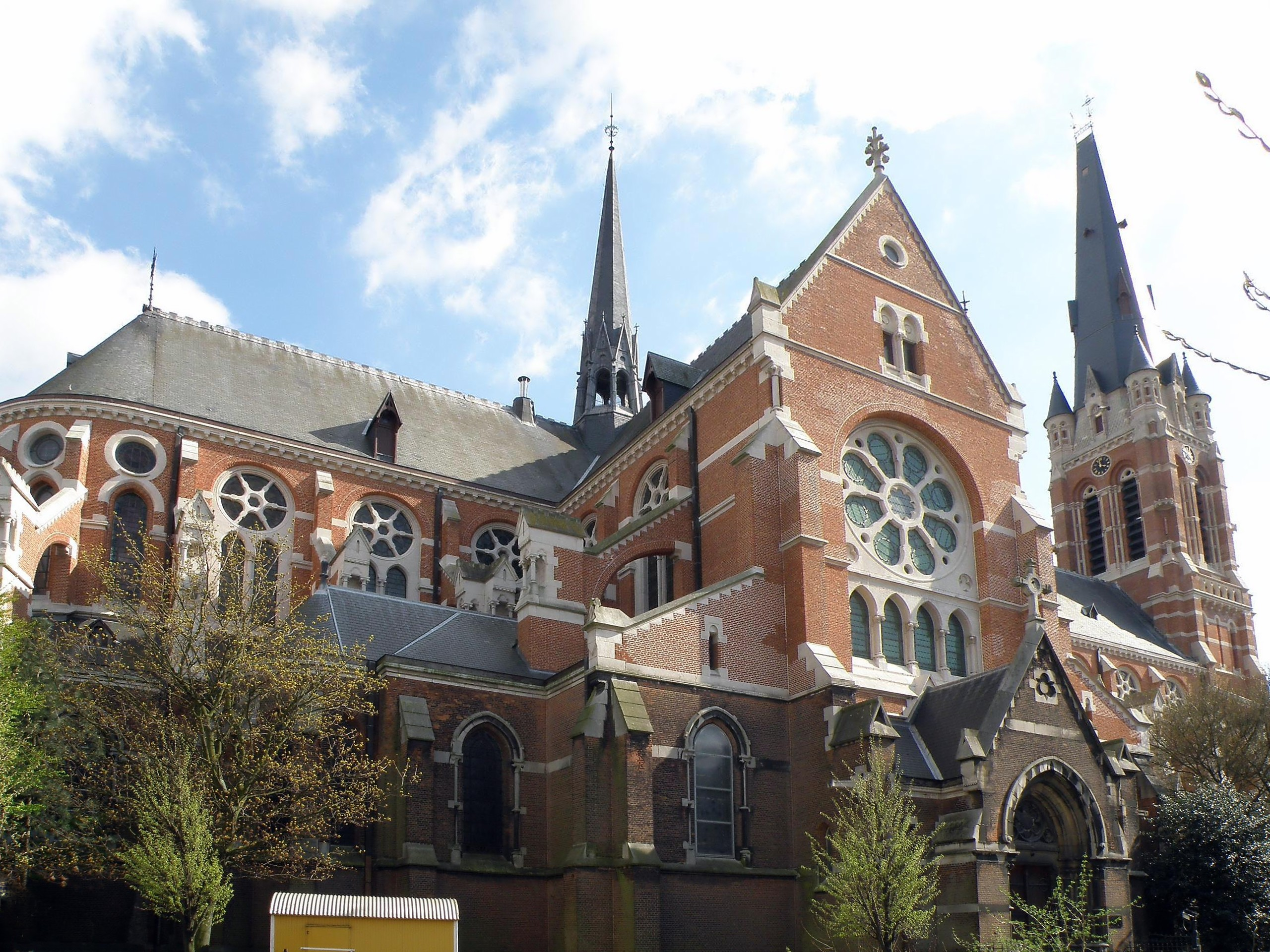 Antwerpen, district Antwerpen. Neogotische parochiekerk Sint-Willibrordus, aan de Kerkstraat, n.o.v. Leonard Blomme (1886-91).